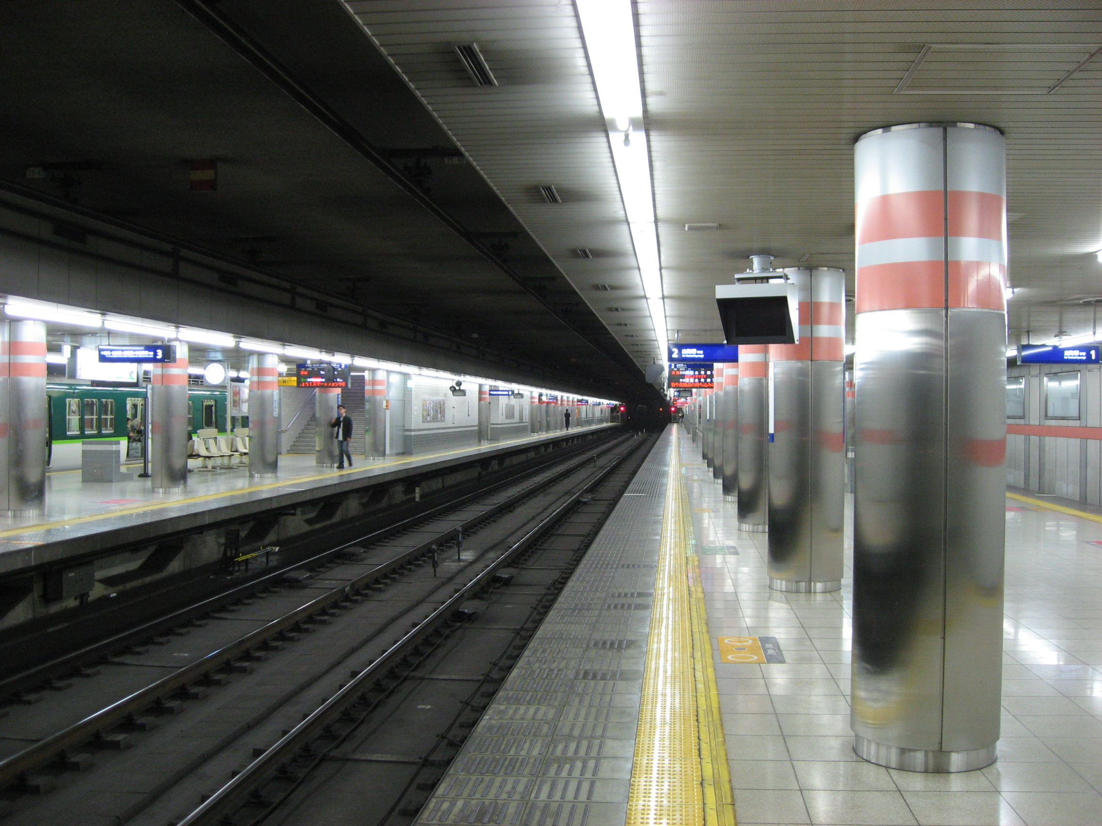 京阪三条駅プラットホーム